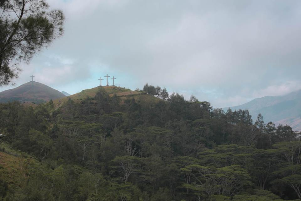 Christusstatue und Bergkreuze in Letefoho